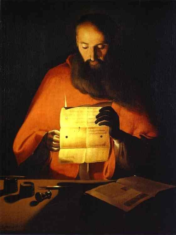 Georges de La Tour (atelier) Saint Jerome lisant Musee Lorrain